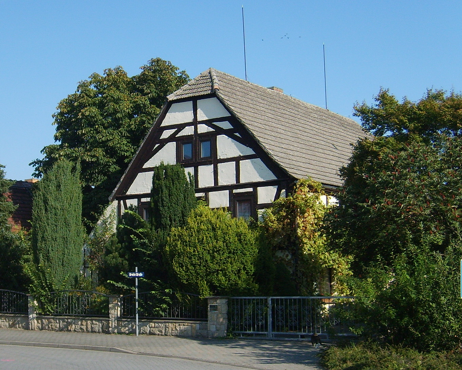 Saathain -Baudenkmal in der Breiten Straße